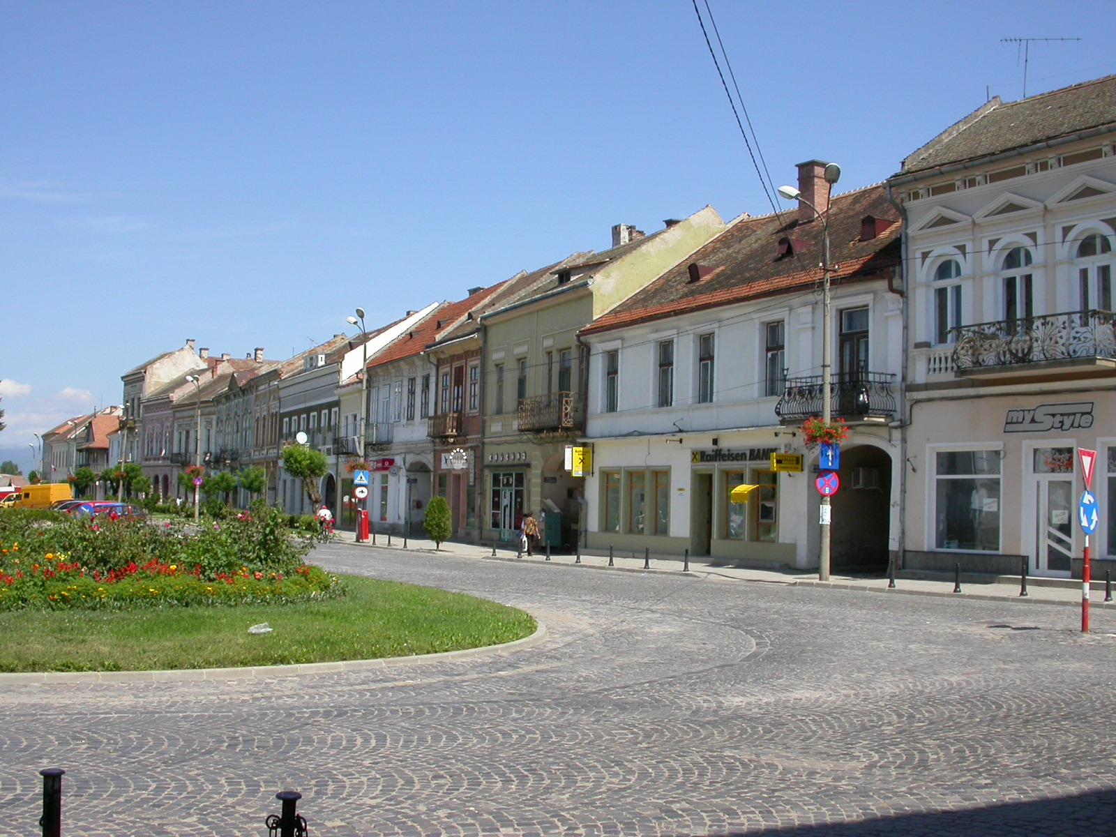 Centrul istoric